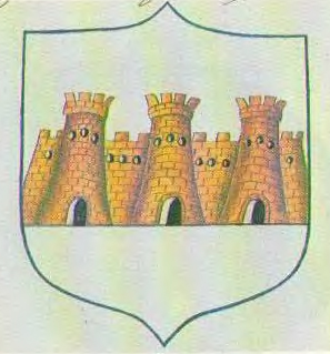 Беларуская (тарашкевіца): Герб Суража (Suraž)